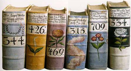 Desky zemské - zobrazení hřbetu knih